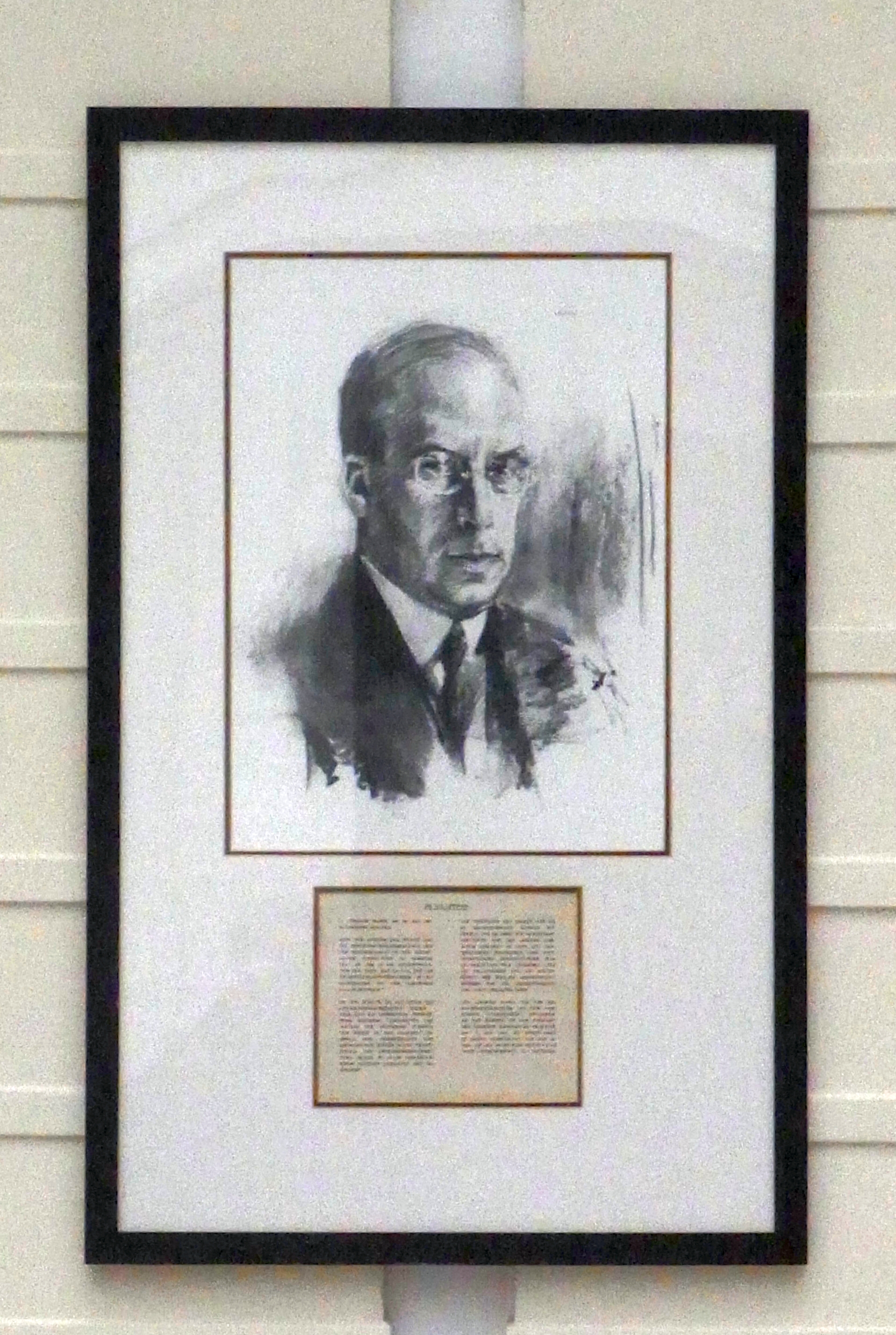 unsignierte Lithographie mit dem Bildnis von Leo Lippmann am Eingang zum Leo Lippmann-Saal